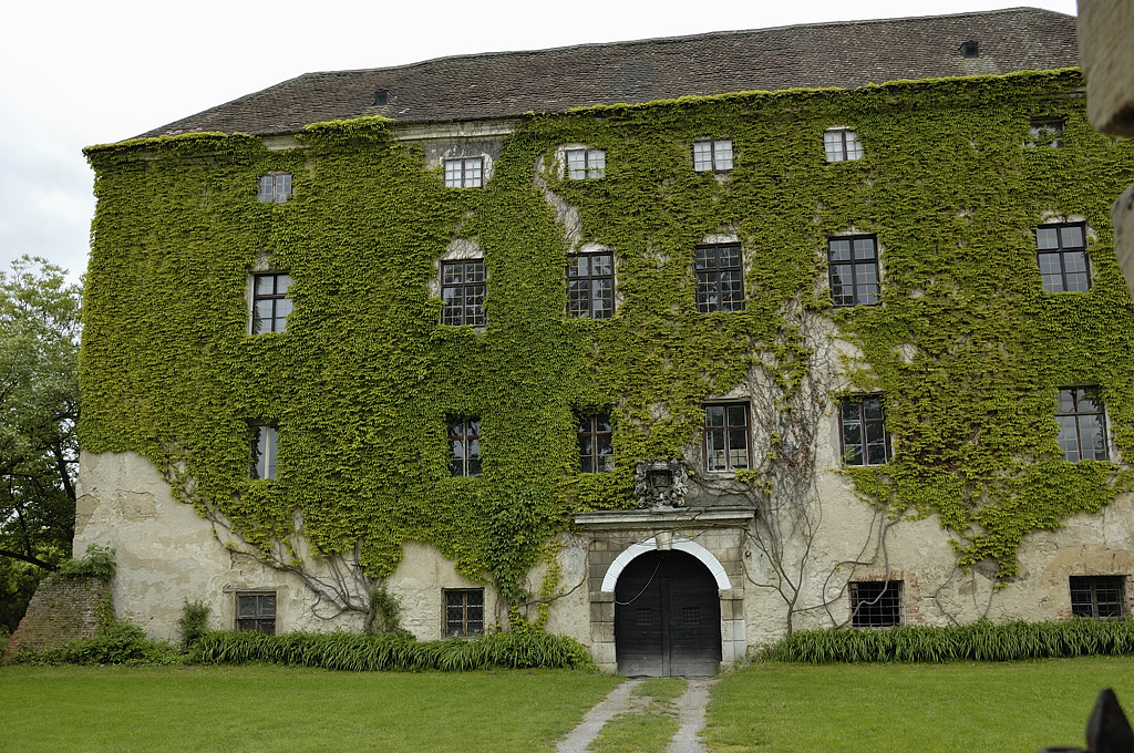 Schloss Hagenberg